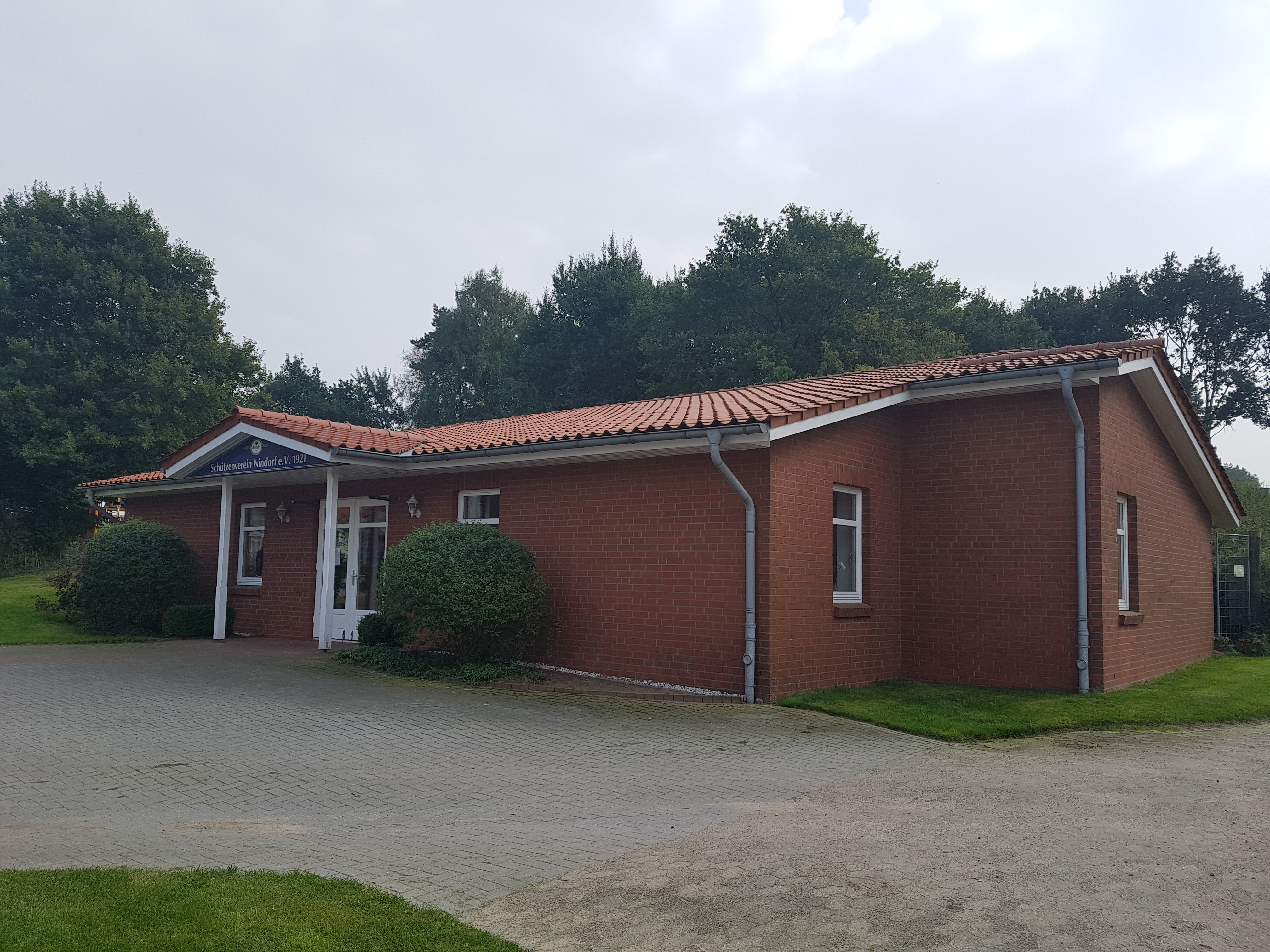 Schüttenvereen in Nindörp